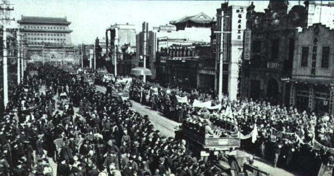 1965-02 1949年 解放军进入北京西门